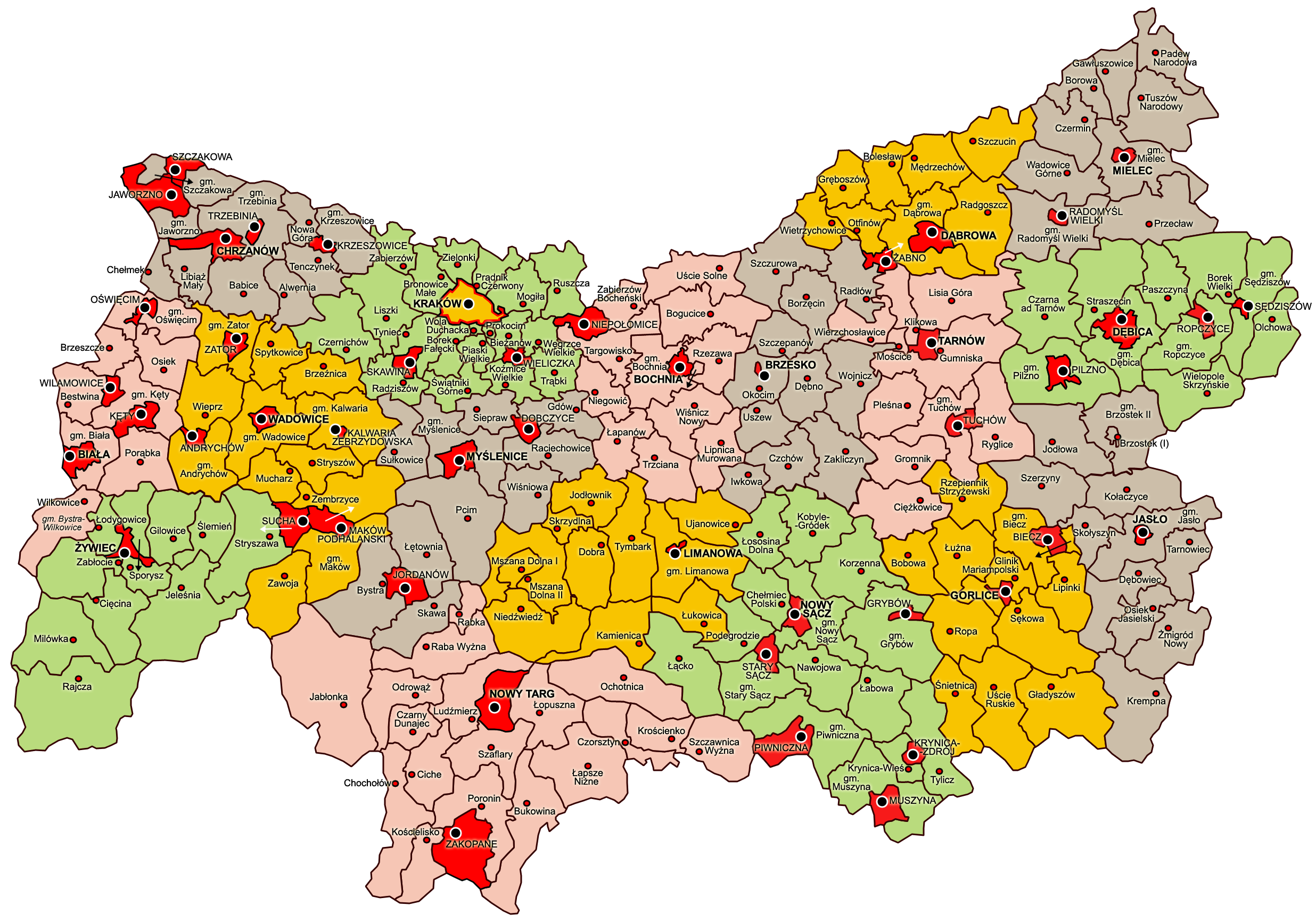 Polska: Mapa administracyjna województwa krakowskiego, stan na rok 1938 (Administrative map of Kraków Voivodeship as of 1938)